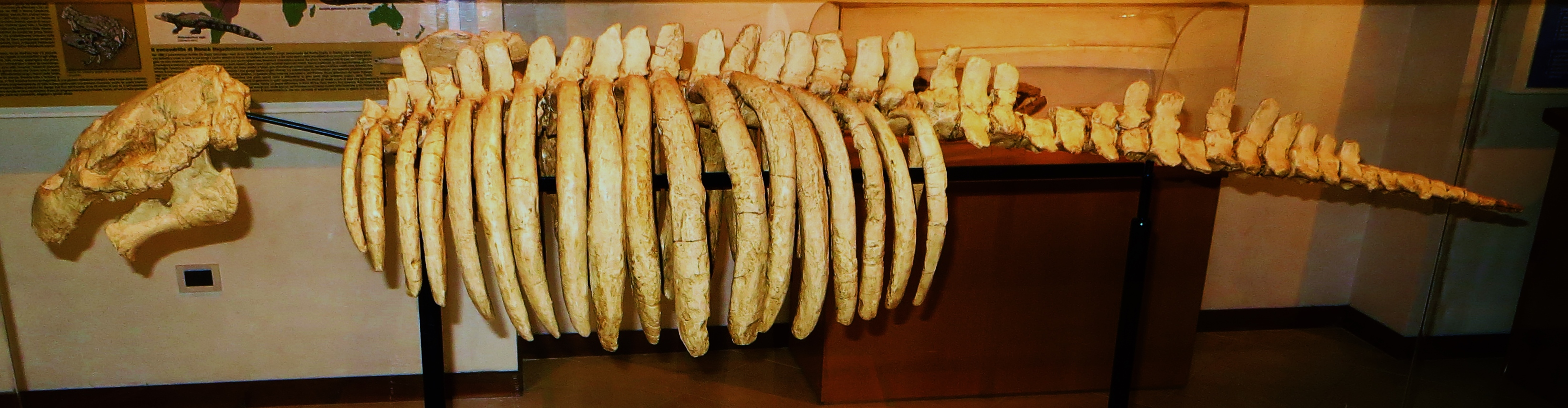 Fossil of Prototherium- Museo Paleontologico di Roncà